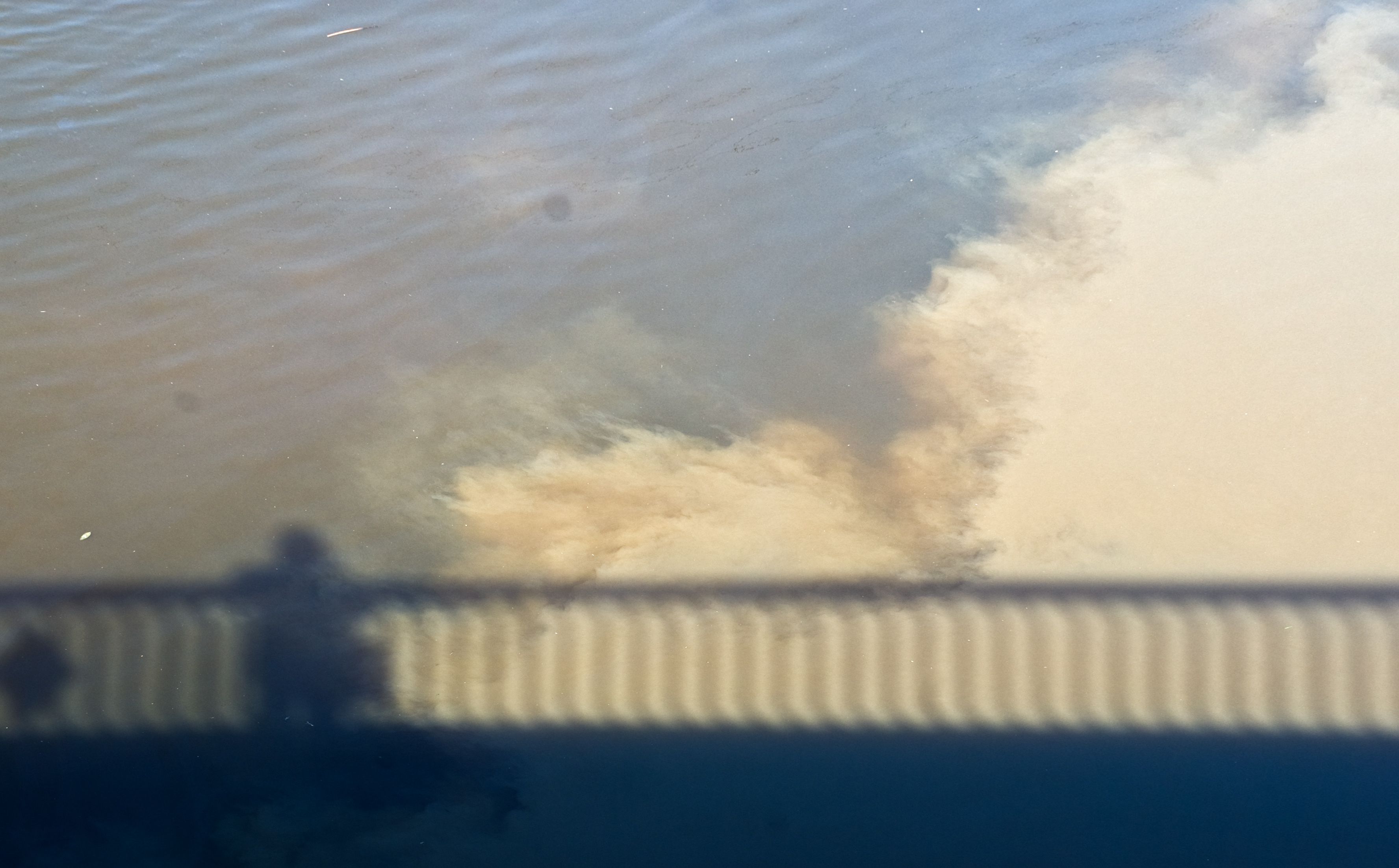 Слияние Обводного канала и реки Екатерингофки (воды Обводного справа)